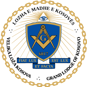 LMK Logo Zyrtare